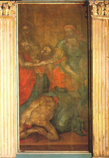 Усекновение главы св. Иоанна Предтечи. Икона Софийского собора в Вологде.